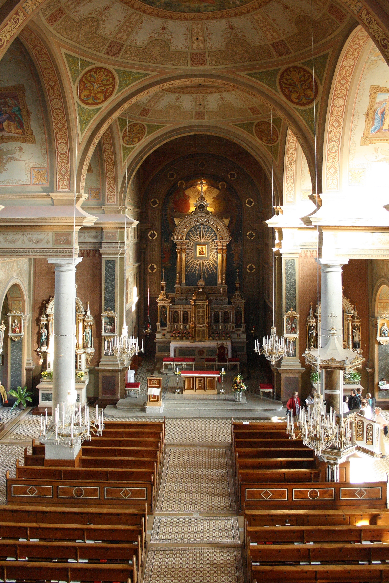 Innenansicht der Wallfahrt- und Pfarrkirche Maria Puchheim in der oberösterreichischen Stadt Attnang-Puchheim.